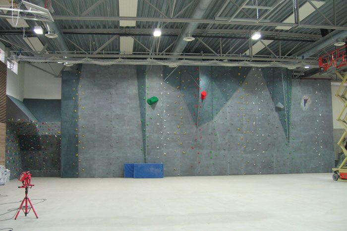 Rocódromo construido por Top30 en Noruega